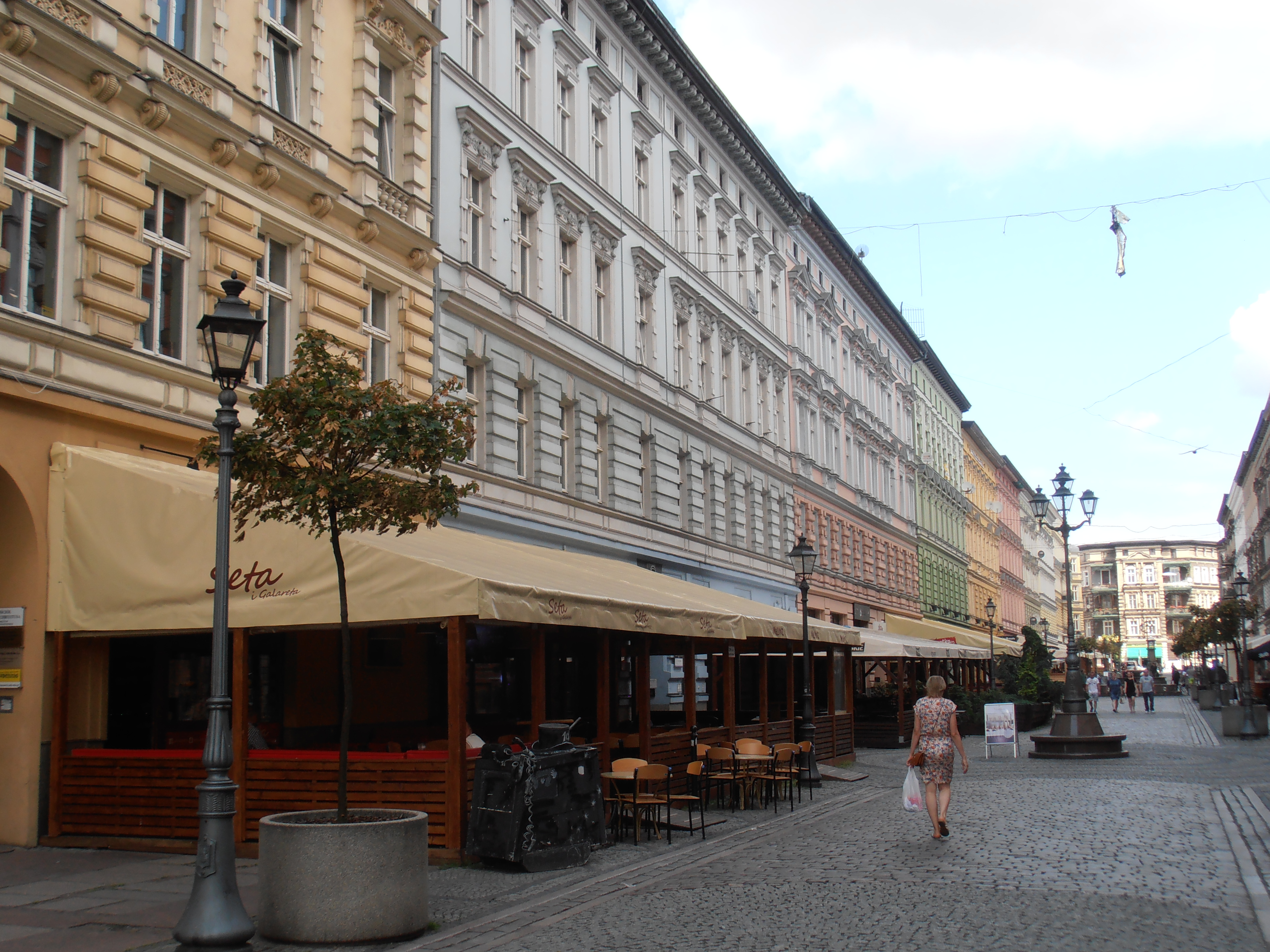 ul. Bogusława X w Szczecinie